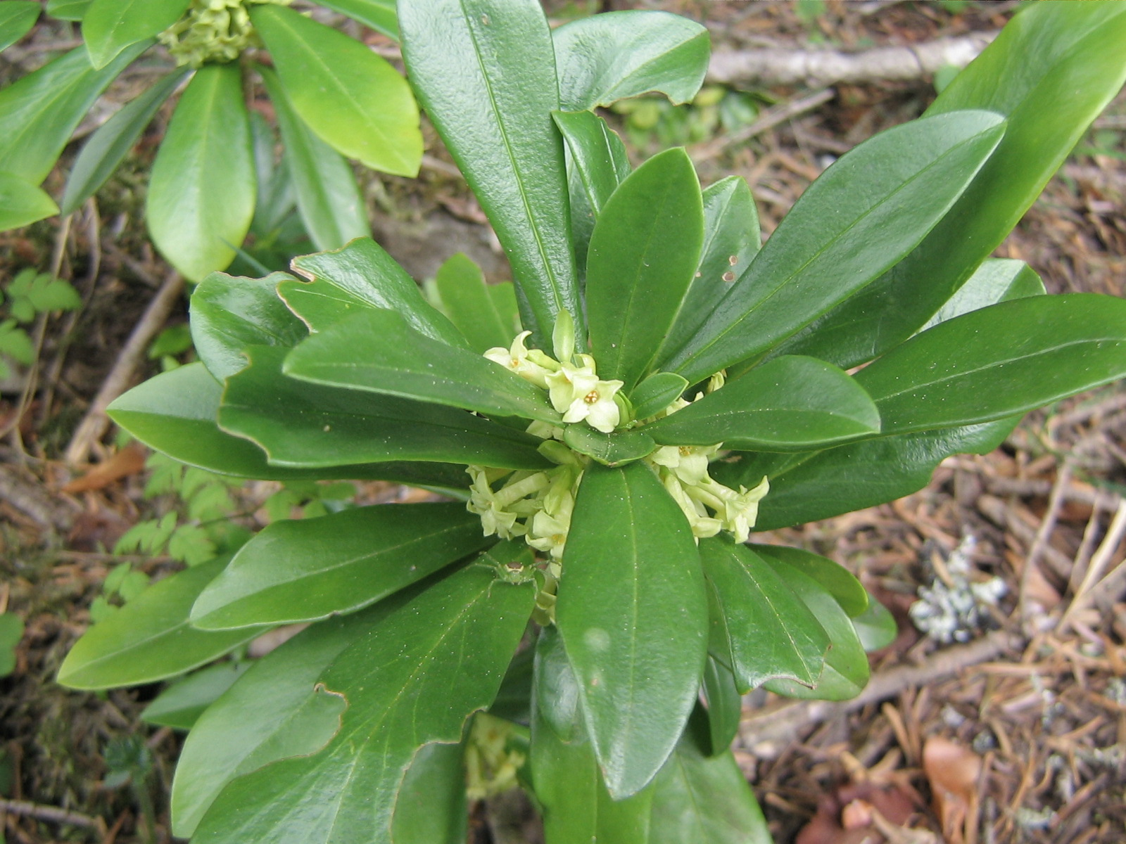 Daphne Laureole dans les Pyrénées